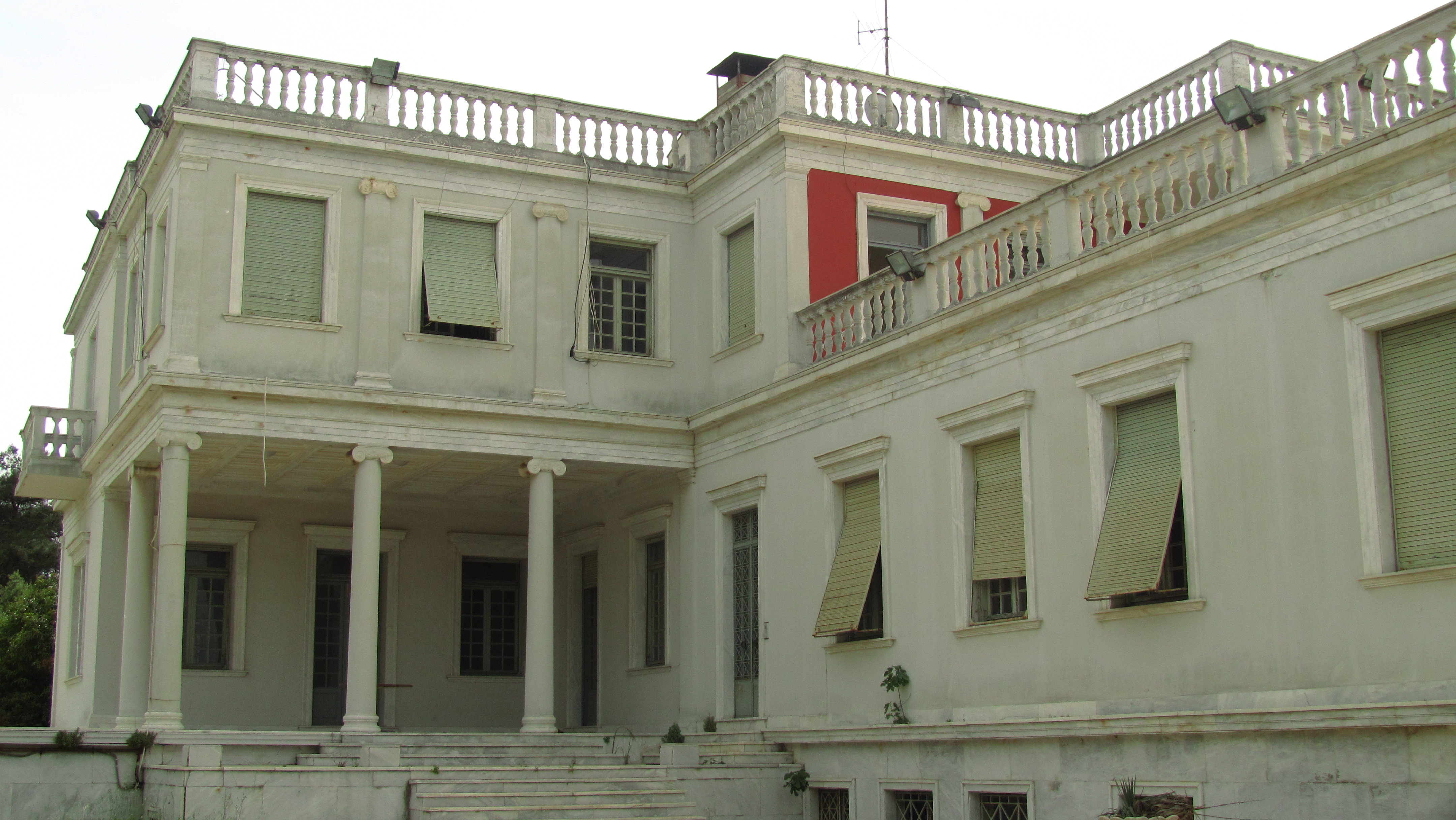 ΘΕΣΣΑΛΟΝΙΚΗ-ΚΑΛΑΜΑΡΙΑ- ΤΟ ΠΑΛΑΤΑΚΙ